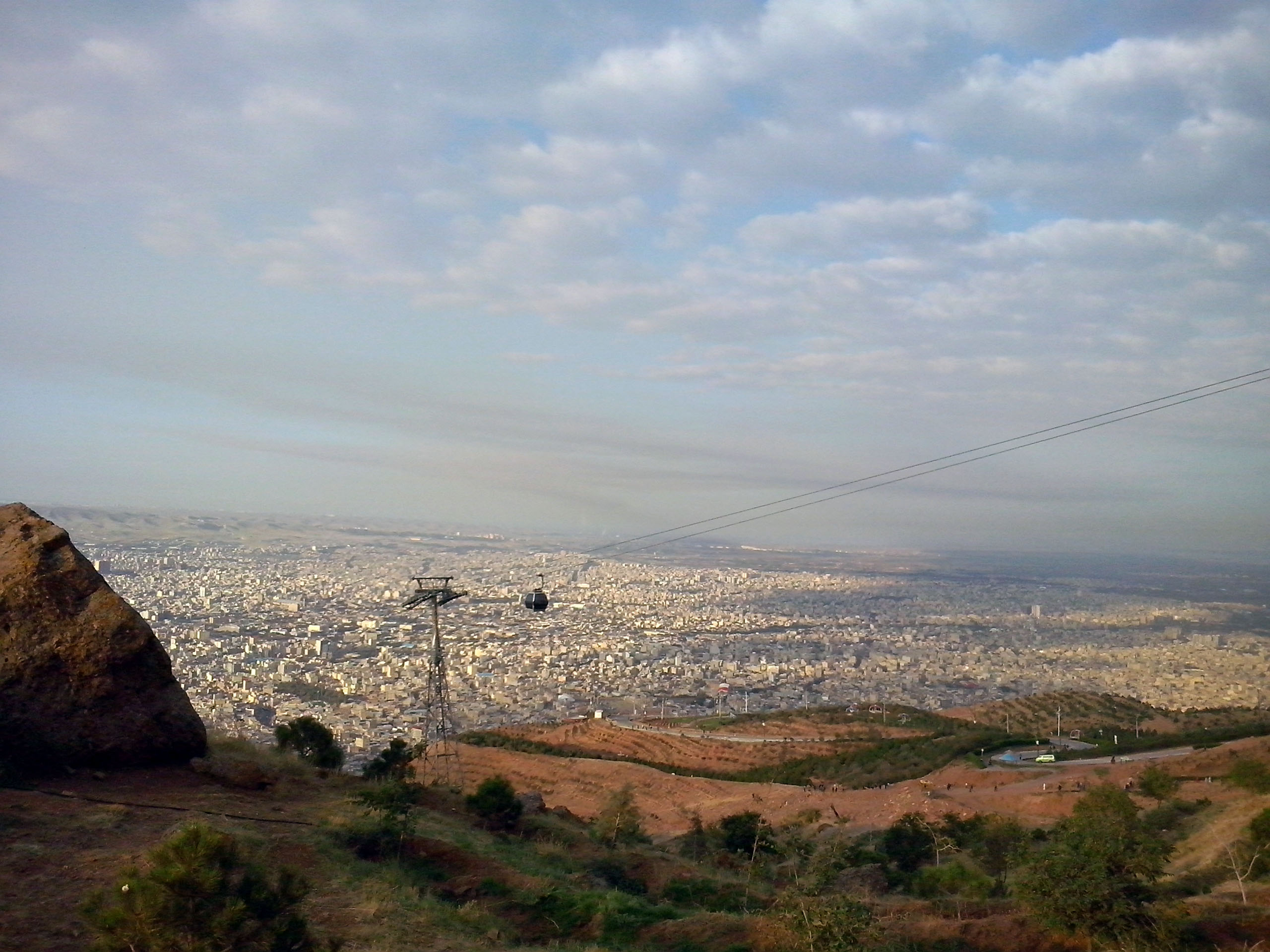 نمایی از غرب تبریز از کوه عینالی.